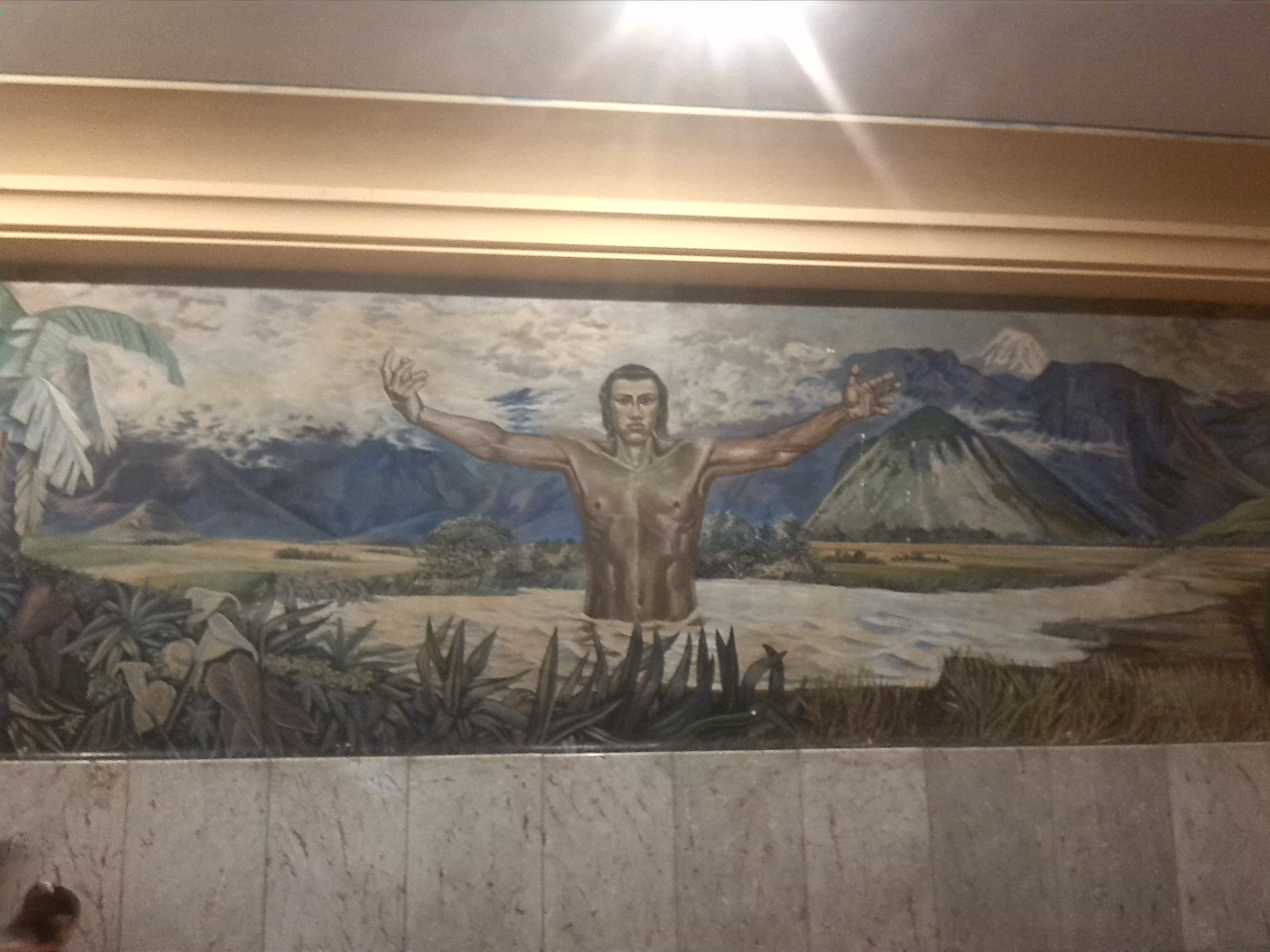 Mural en el lobby del Teatro cinema Orizaba